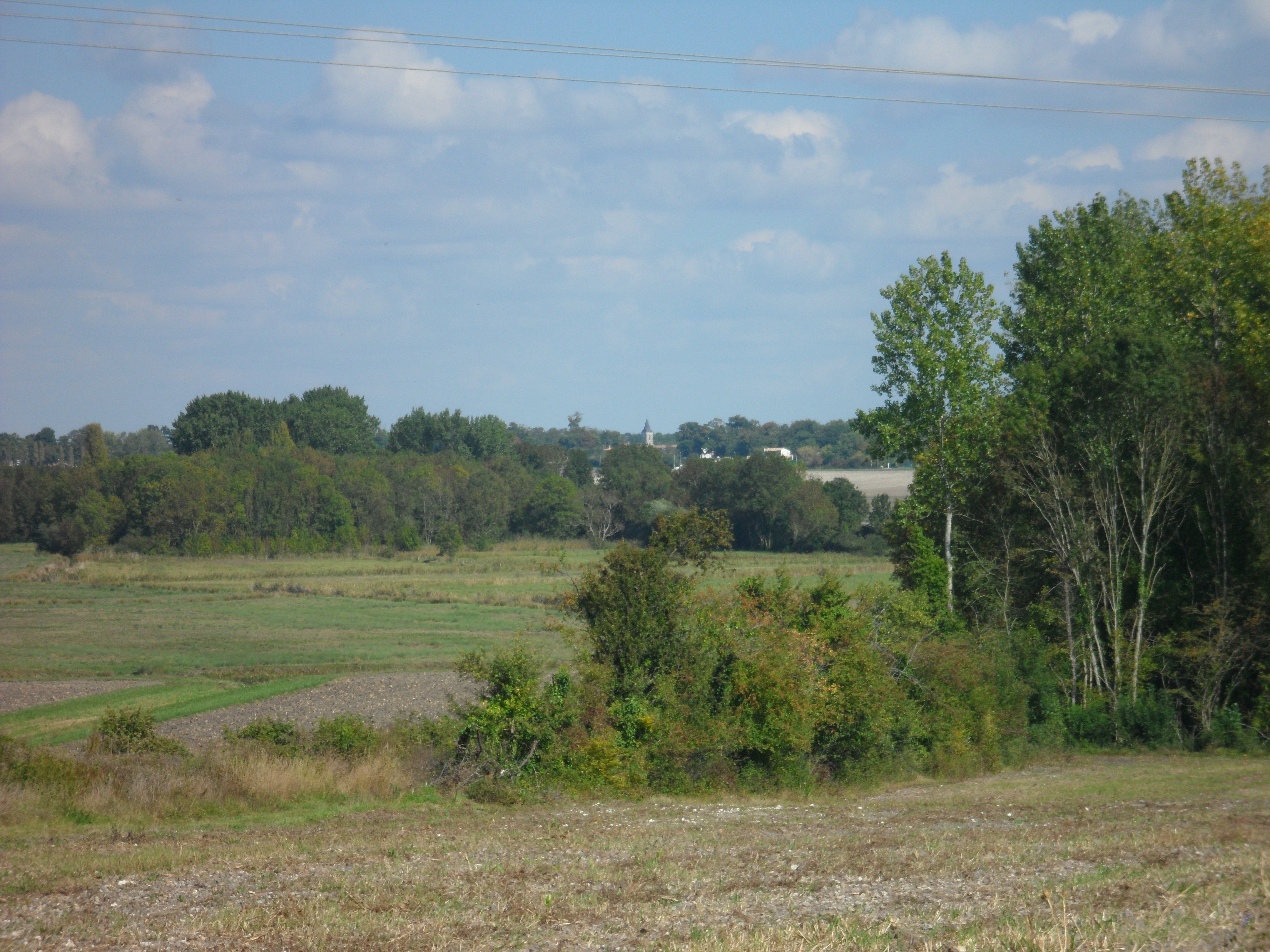 Étaules (Charente-Maritime) vue depuis les marais de Saint-Augustin